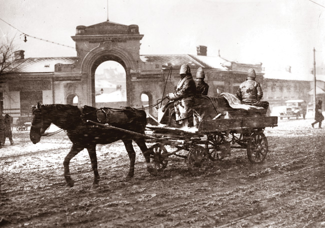 Intrarea principală în Piaţa Bibescu-Vodă de pe Bulevardul Regina Maria